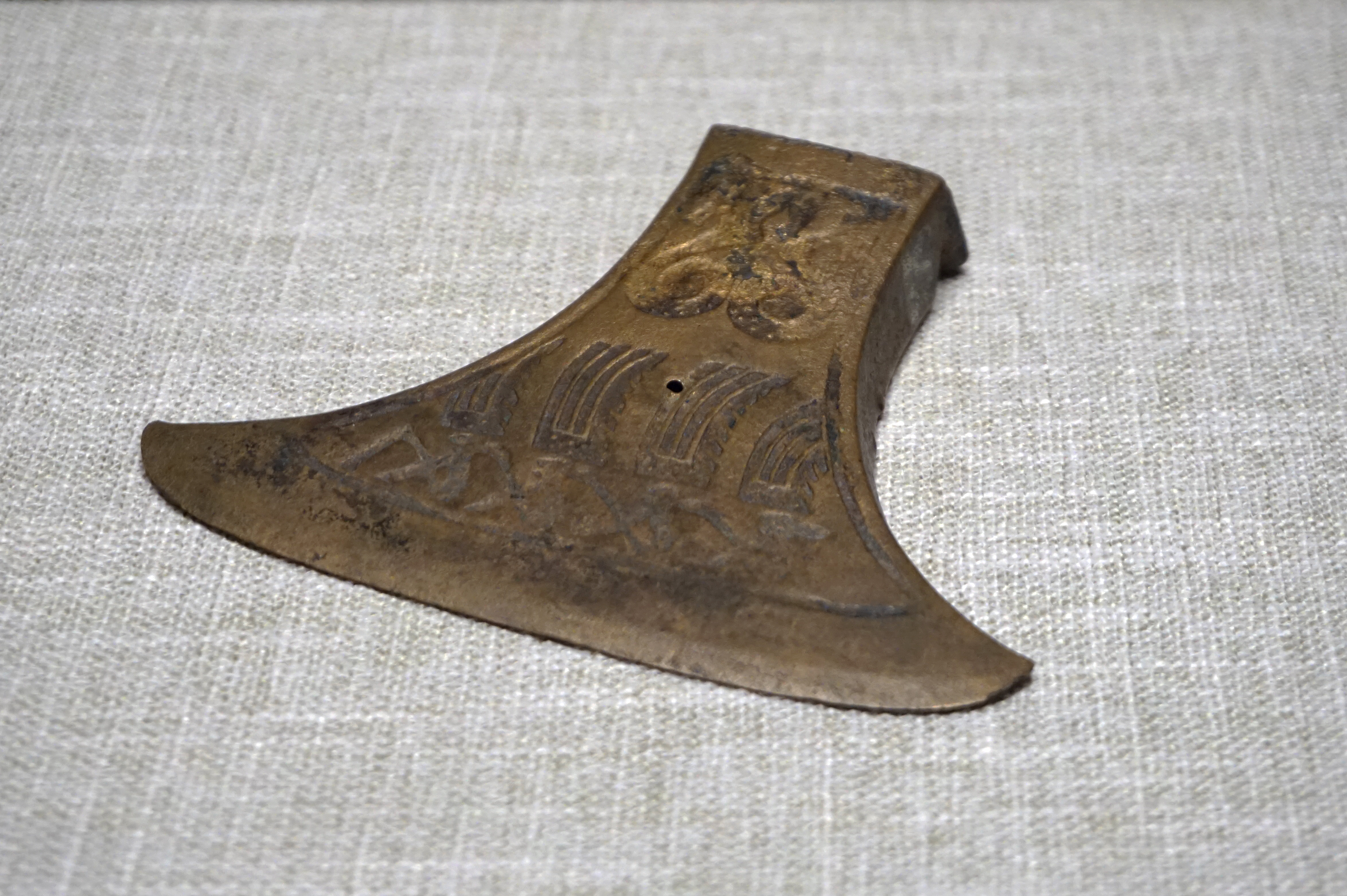 战国羽人划舟纹铜钺，鄞县云龙镇甲村石秃山出土。宁波博物馆藏。